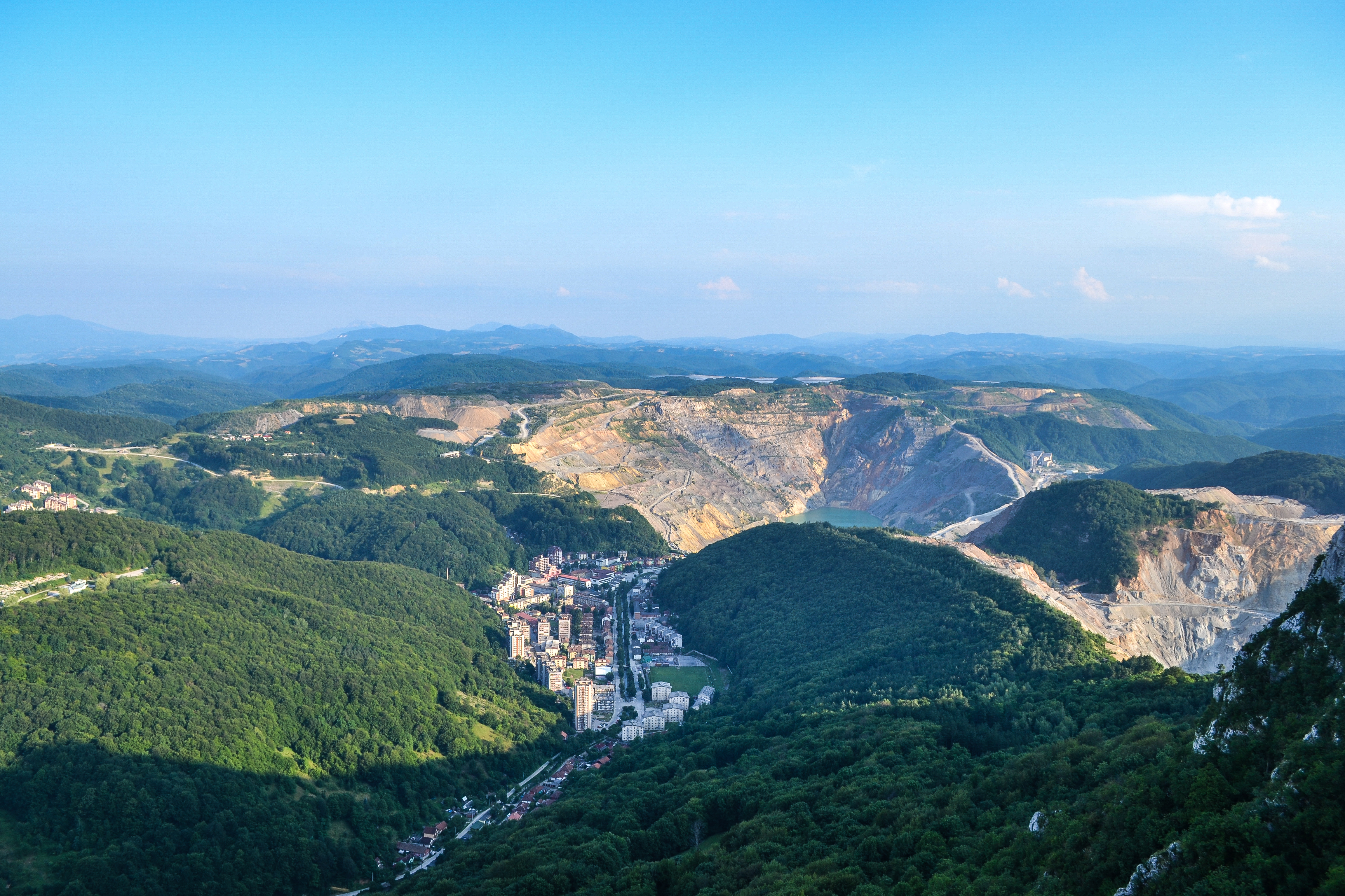 Majdanpek slikan sa vrha planine Starica danju